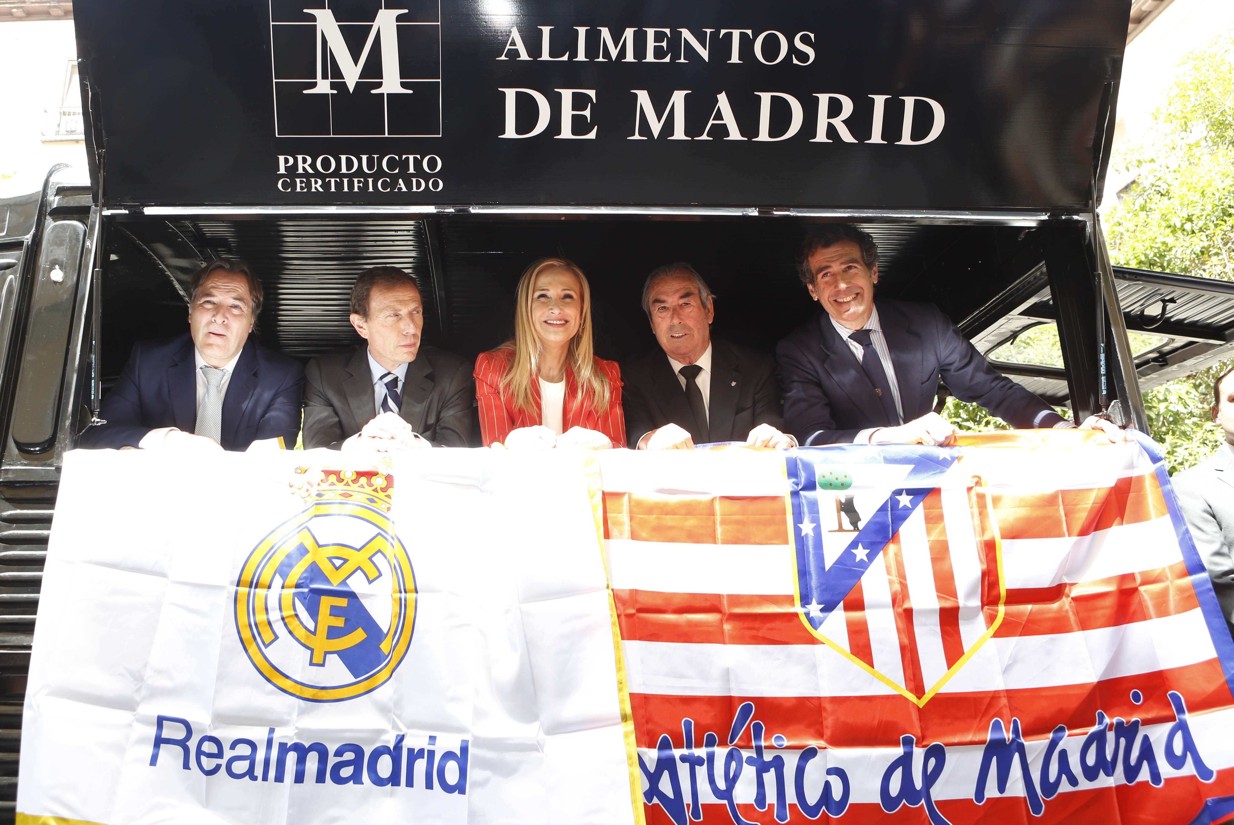 La final de la Liga de Campeones será este año más madrileña que nunca, y no sólo por la presencia de Real Madrid y Atlético de Madrid en el partido decisivo. Del 26 al 28 de mayo, la Comunidad de Madrid va a convertir Milán, la ciudad que acoge el encuentro, en un verdadero escaparate para mostrar a milaneses y visitantes la calidad de los productos gastronómicos de la región y los grandes atractivos turísticos que ofrece su territorio.